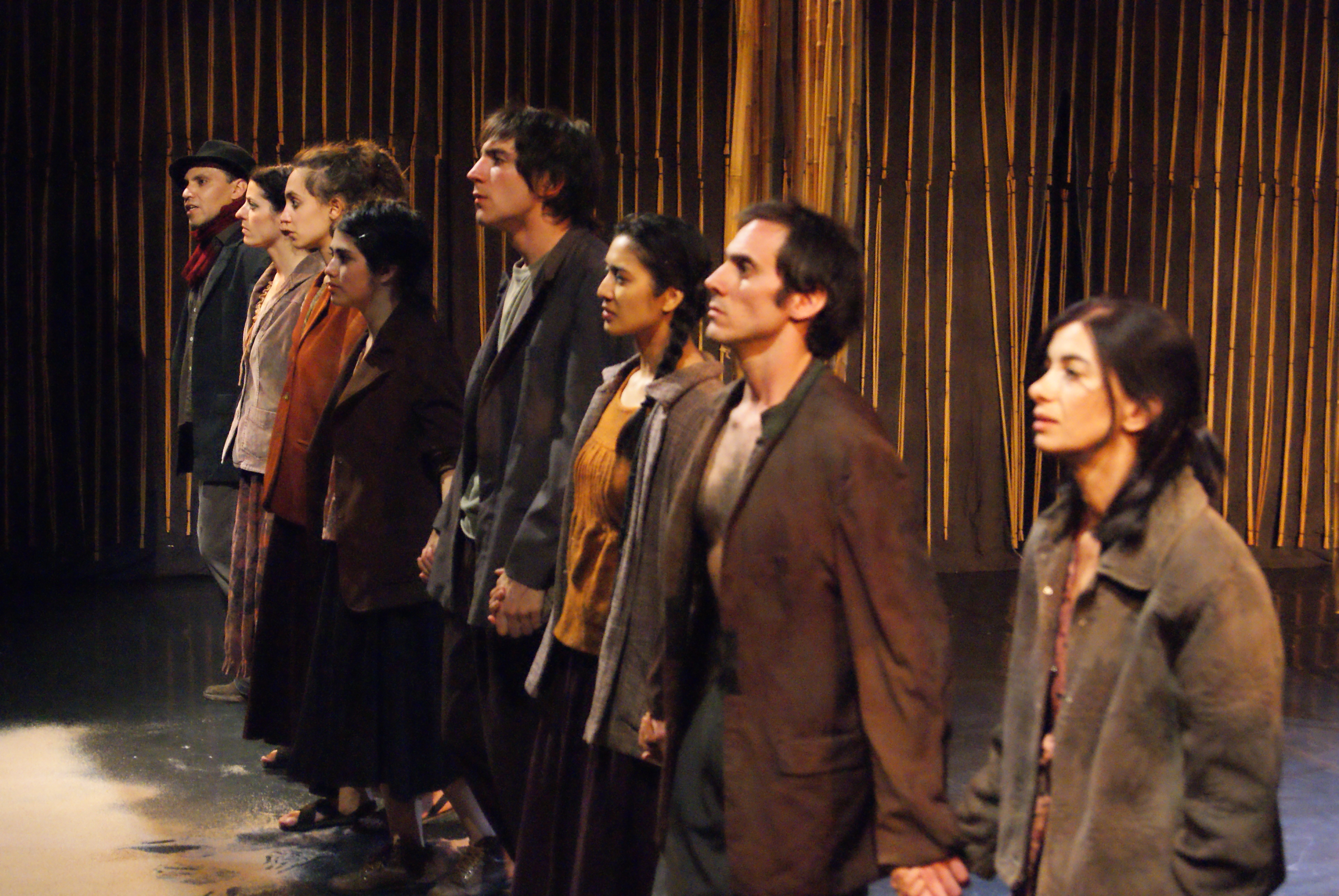 Teatro de los Andes con la obra La Odisea, en el Teatro de la Ciudad, Puebla; durante el festival Barroquísimo 2010